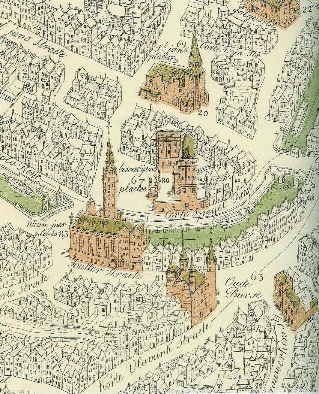 Biskajerplein in Brugge - West-Vlaanderen - Belgium